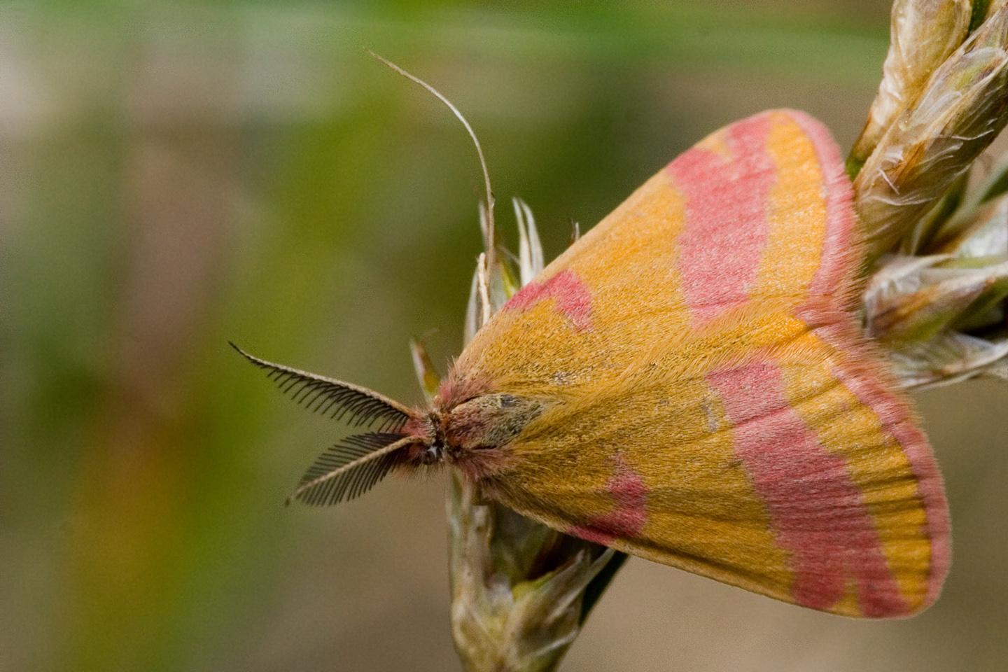 Lythria cruentaria